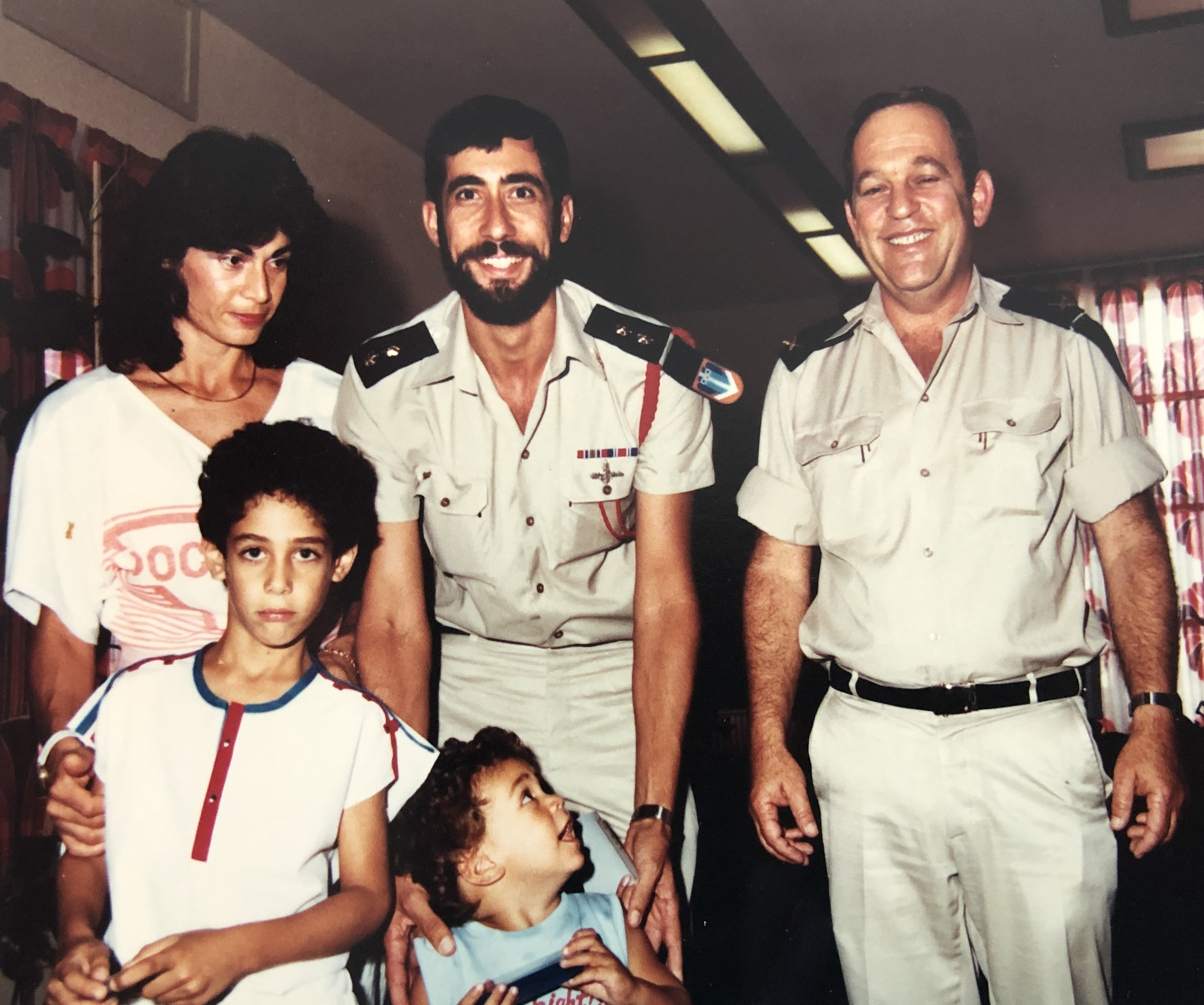 משפחת רונן עם תא"ל מיכה רם בעת קבלת דרגת סא"ל 1985